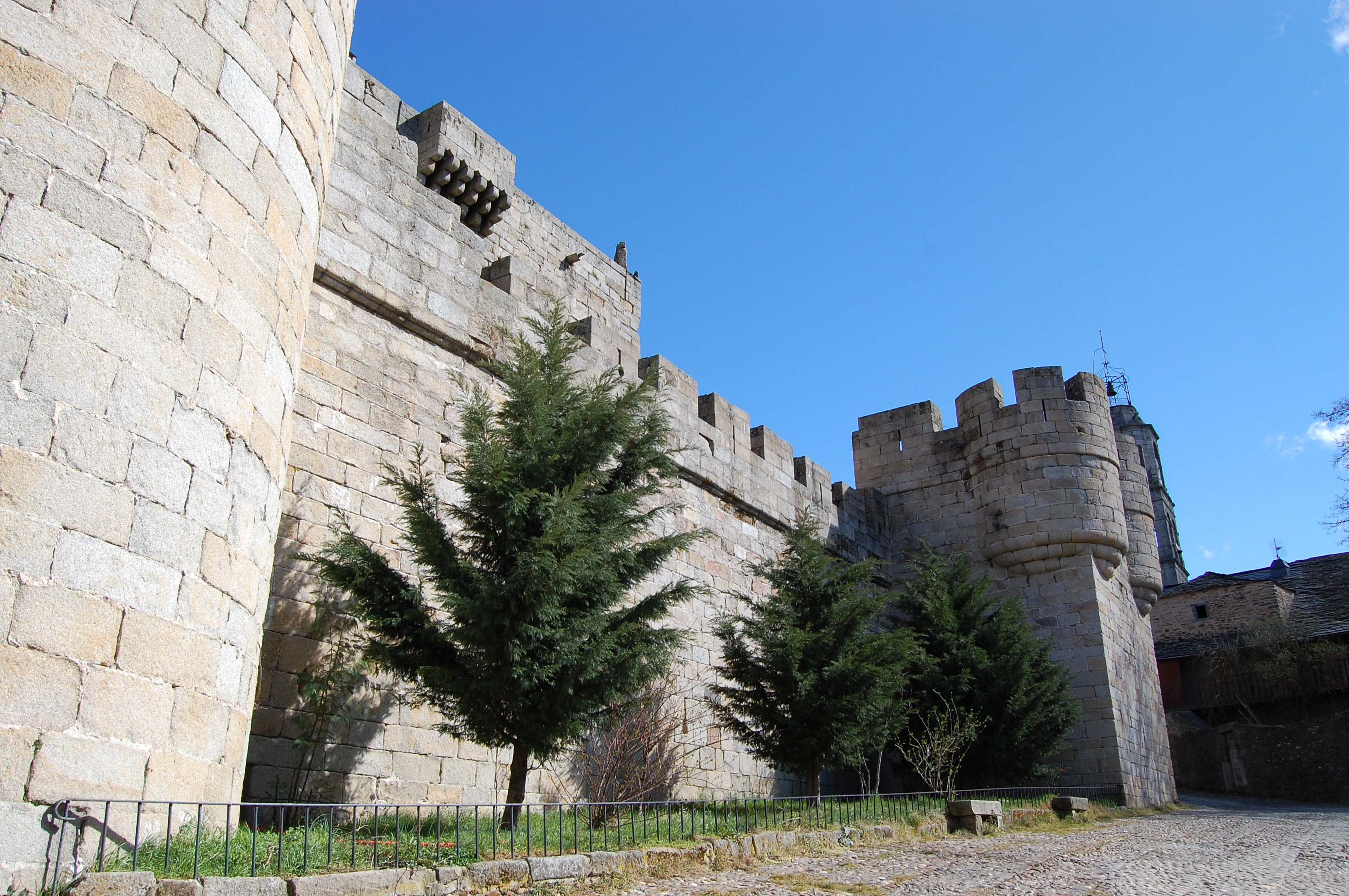 Puebla de Sanabria (Póvoa de Seabra), província de Zamora, Espanha.